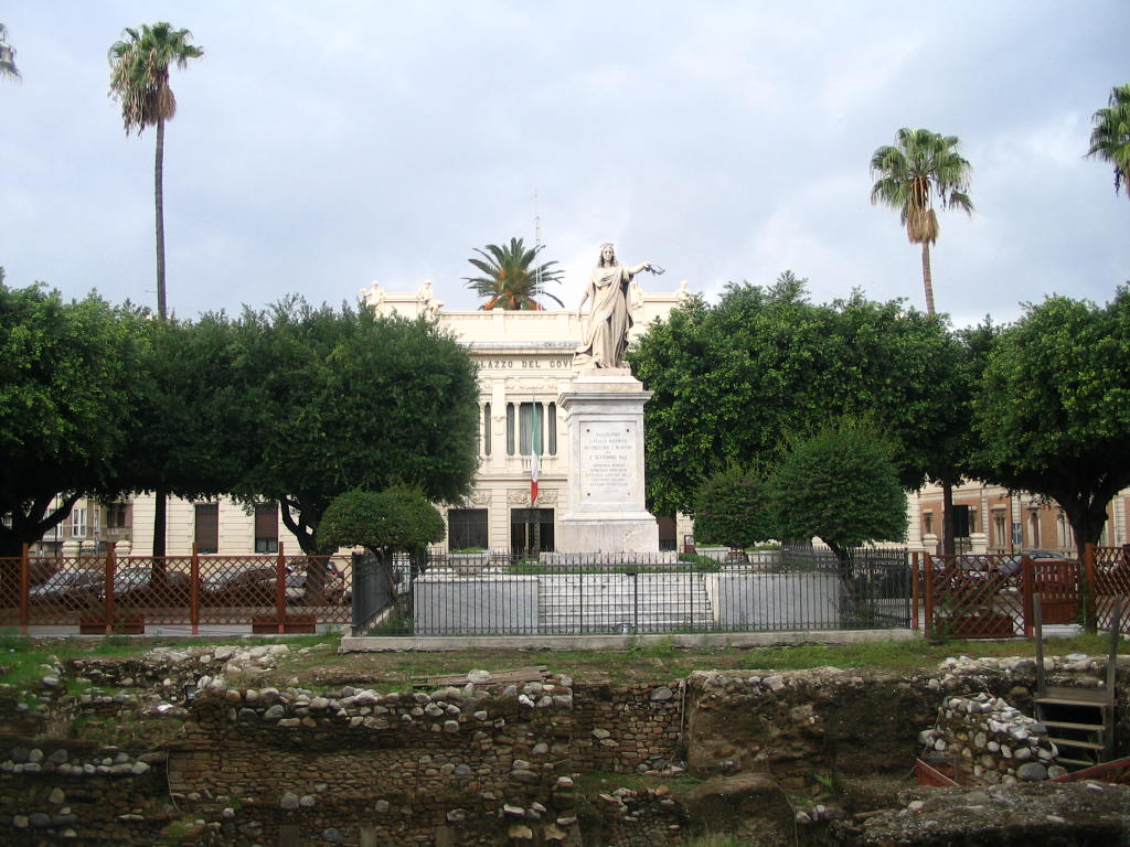 Archaeological site in Piazza Italia, Reggio Calabria - Italy